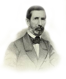 Teófilo Benedito Ottoni (1807-1869), jornalista, comerciante e político brasileiro.